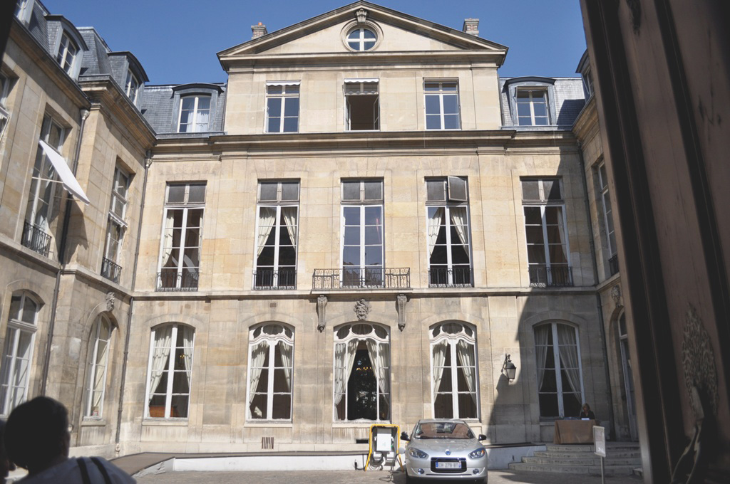 Façade de l'hôtel de Castries L'hôtel de Castries est situé au 72, rue de Varennes, dans le septième arrondissement de Paris. Journées européennes du patrimoine 2012 En 2012, cet hôtel est affecté au cabinet du ministère de l'Égalité des Territoires et du Logement.